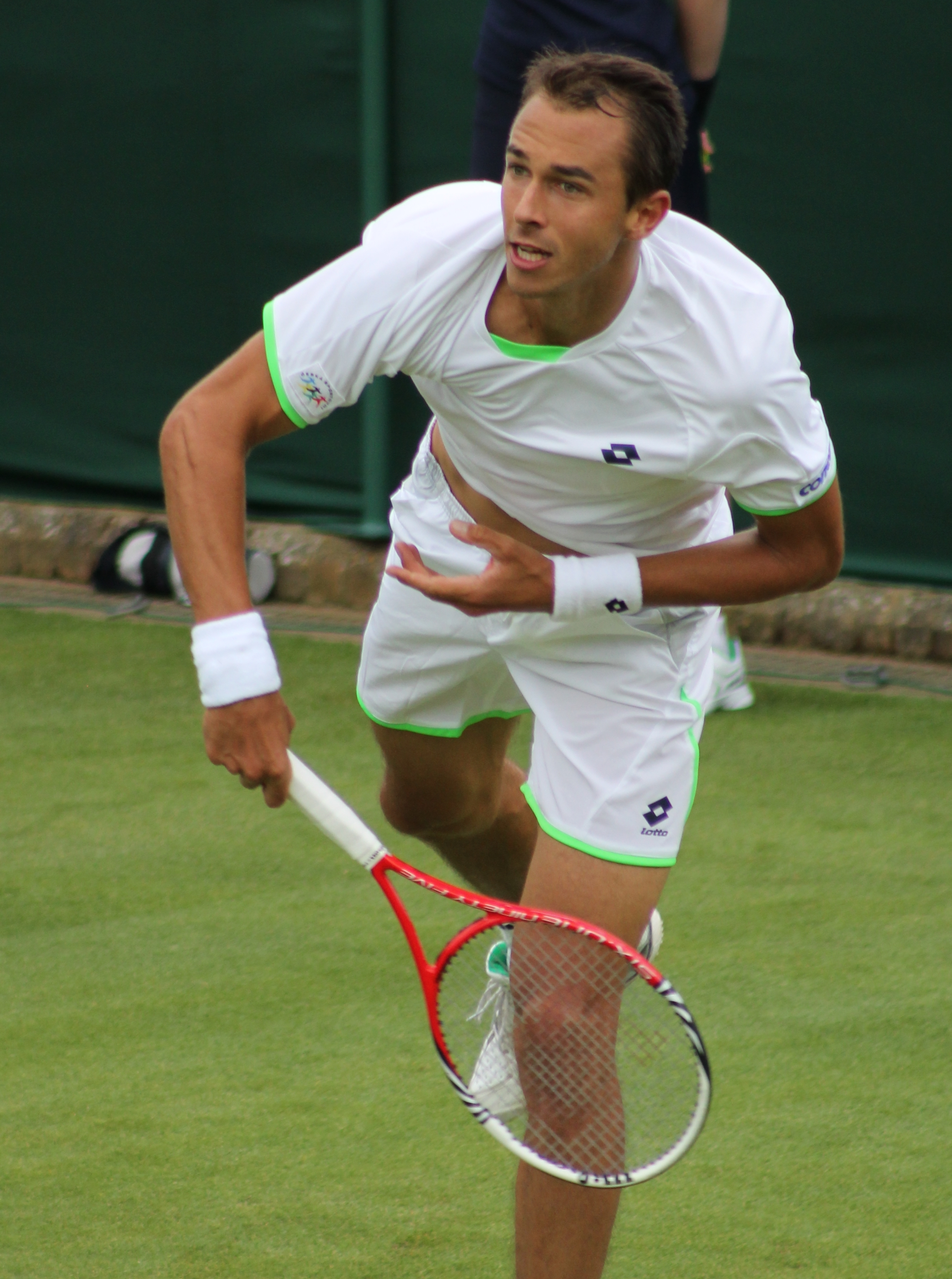 Rosol WM13-002